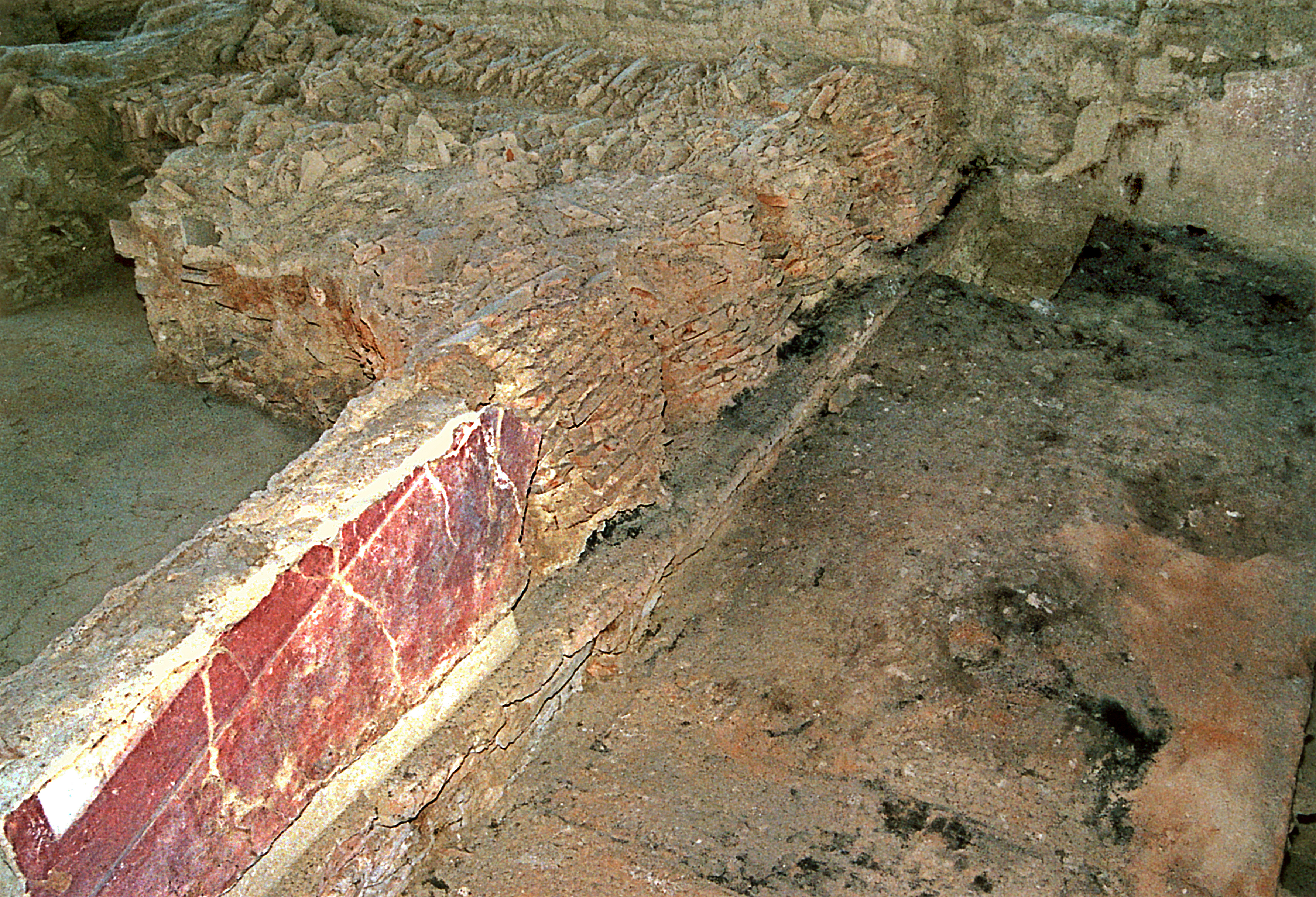 Villa Rustica Ahrweiler: Das während der Nutzungsphase als Mansio (Rasthaus) eingebaute Treppenhaus. Die verkohlten Reste der Treppe sind ebenso sichtbar, wie ihre Abdrücke im Boden. Teile der umgestürzten Fachwerkwand wurden während der musealen Herrichtung an ihrem ursprünglichen Platz belassen. Die Reste der Malerei zeichnen den Steigungswinkel der Treppe nach.